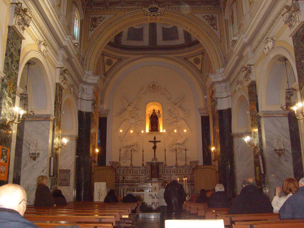 Navata centrale della Chiesa del Carmine di Cerignola (FG).